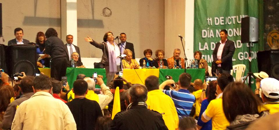 La candidata a la presidencia de Colombia: Aída Abella, dando su discurso en el V congreso de la Unión Patriótica